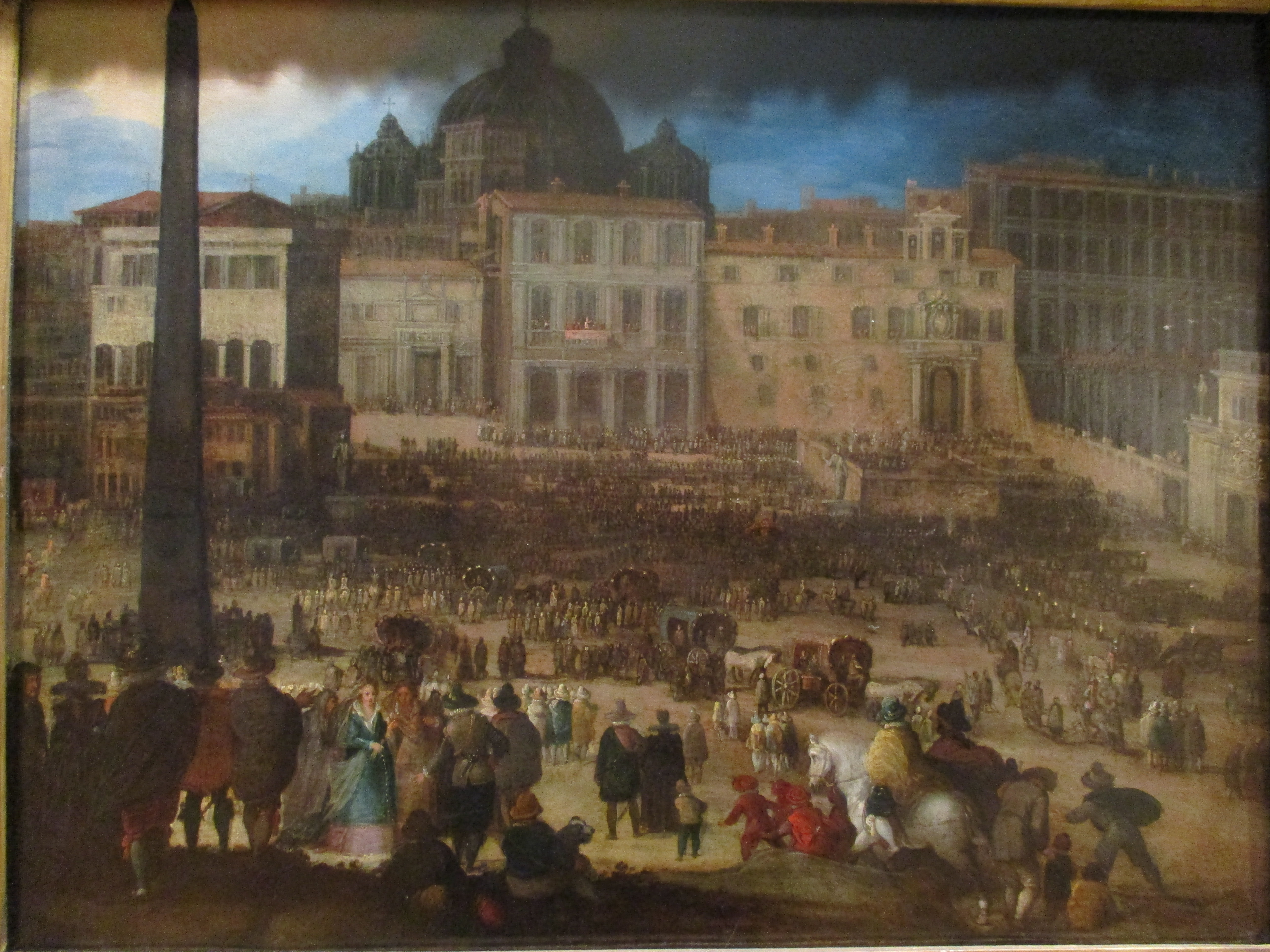 Louis de Caullery (1580-1621), Vue de la place Saint-Pierre de Rome lorsque le pape Clément VIII apparaît à la loggia après son élection en 1592 (vers 1600), huile sur cuivre. Collections du Petit Palais (Paris). Inventaire PPP 04833; achat en 1990.